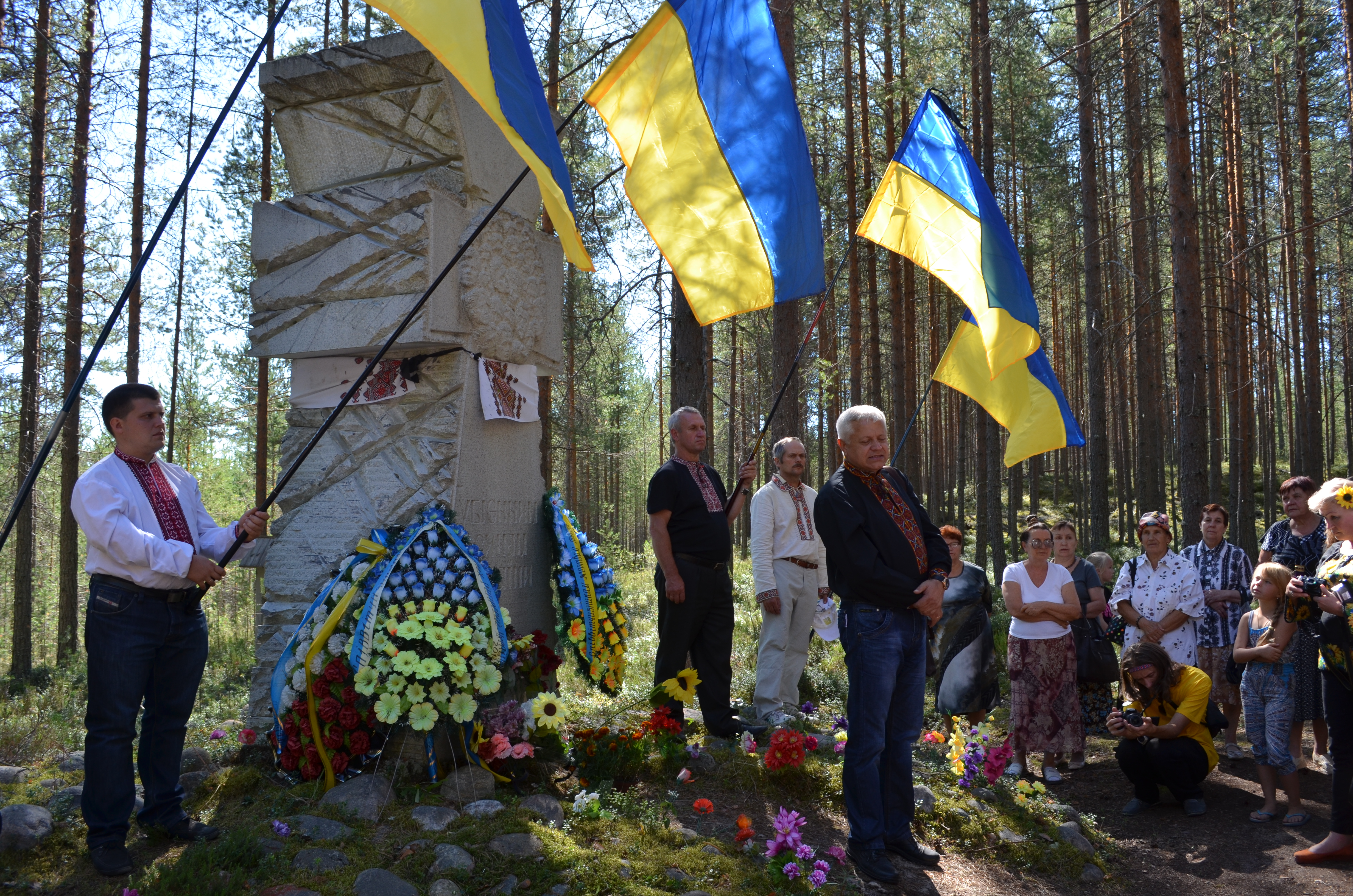 Урочище Сандармох. Дні пам’яті. Під час панахиди за загиблими українцями